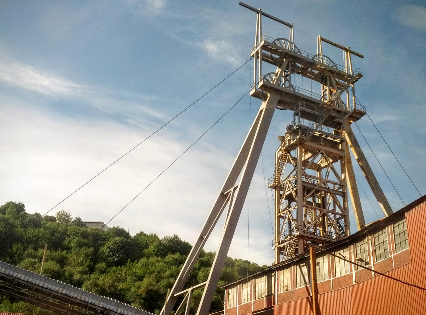 Castillete del pozo María Luisa, en Ciaño (Langreo), Asturias (España)